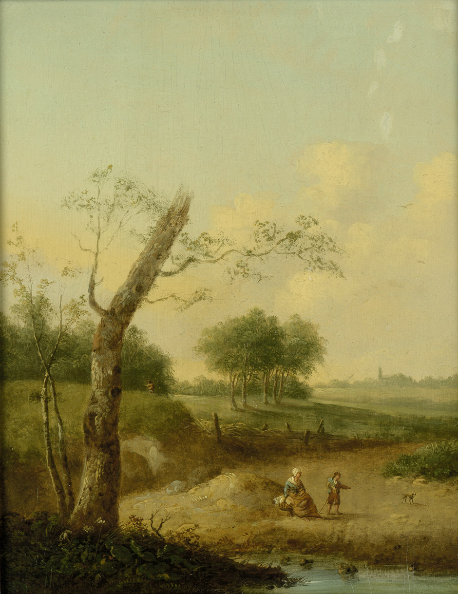 Johann Georg Schütz (1755-1813): Flachlandschaft mit einer Bäuerin und ihrem Sohn am Fluß, im Hintergrund ein Jäger. Öl auf Eichenholz. 23 x 19 cm.